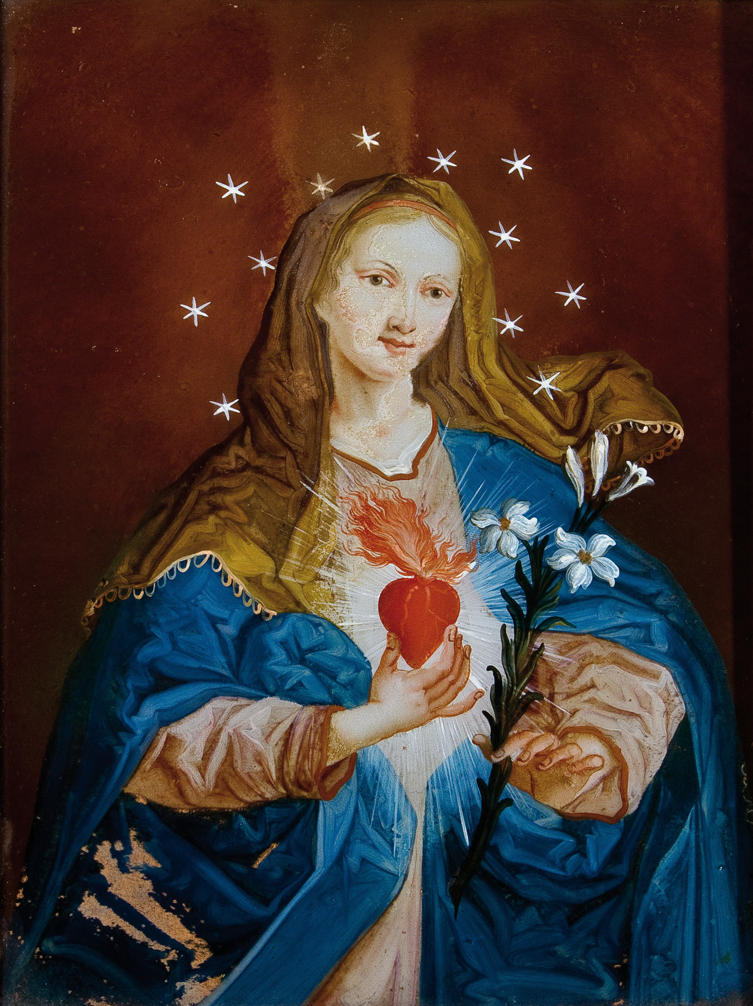 Maria mit flammendem Herz; Hinterglasbild, 29 x 23 cm; Augsburg oder Murnau, 2. Hälfte 18. Jahrhundert